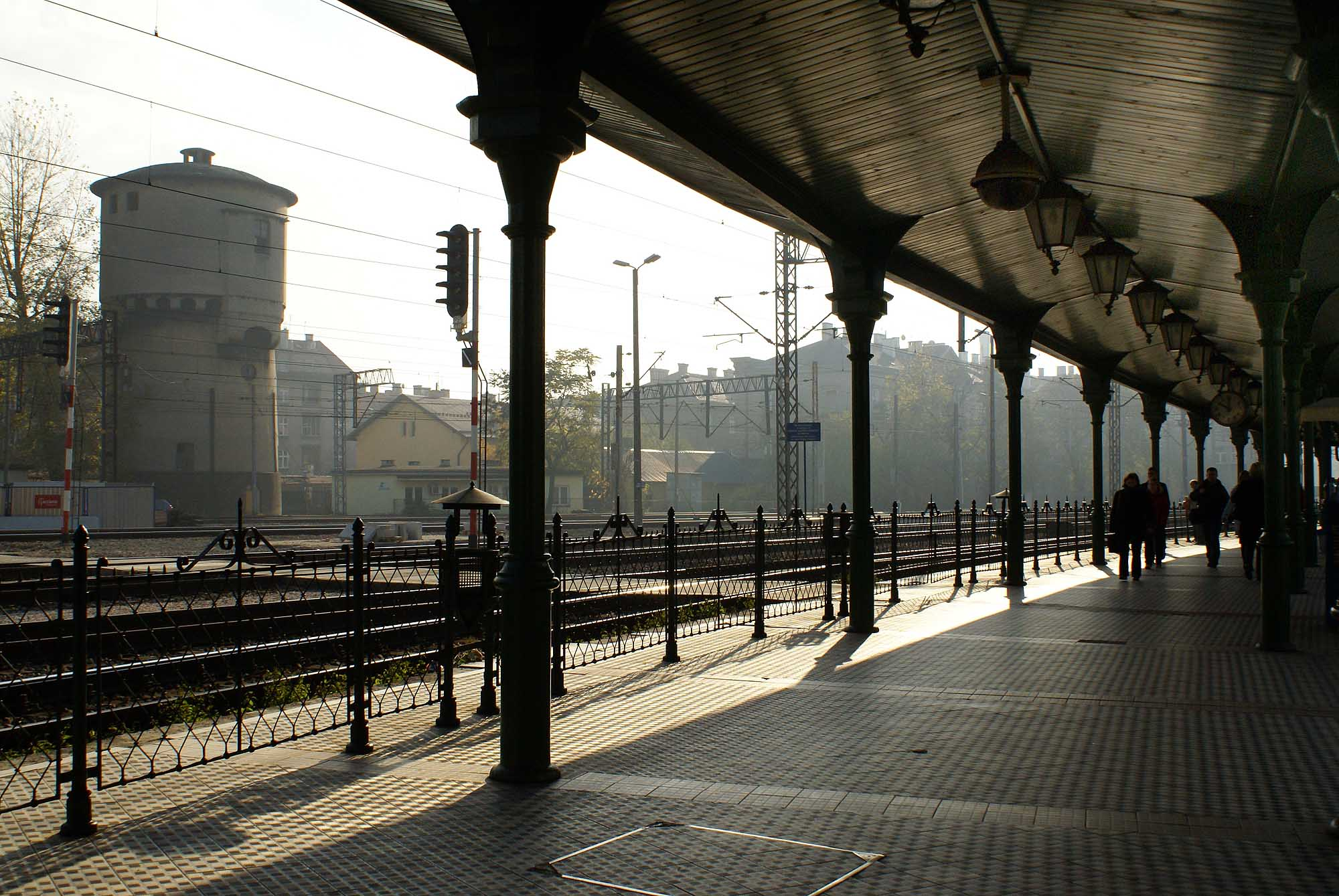 Kraków, dworzec PKP, 1844-1847, ok. 1880